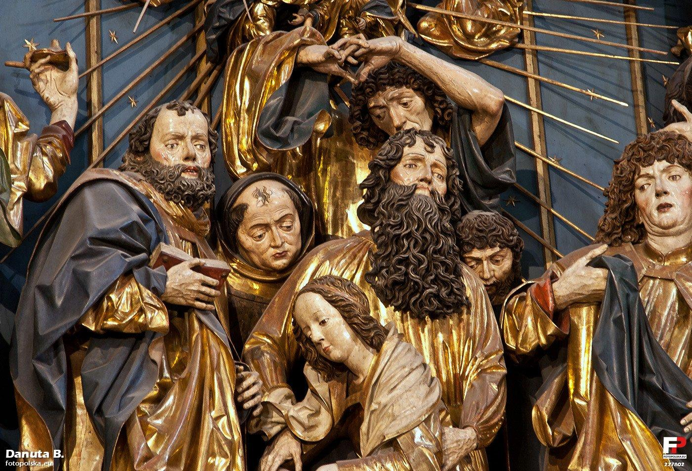 Jedno zdjęcie, by nie zanudzać. Zbliżenie na figury słynnego ołtarza wykonanego w latach 1477–1489 przez niemieckiego rzeźbiarza Wita Stwosza. Główną sceną ołtarza, znajdującą się w środkowej szafie, jest zaśnięcie Marii Panny. Senna Maria Panna, otoczona jest przez apostołów. Postać Marii i podtrzymującego ją świętego Jana jest wycięta z jednego pnia drewna lipowego, podobnie jak postacie Chrystusa, jego matki i dwóch aniołów w scenie wniebowzięcia. Skupiłam się na twarzach, bo ciekawa ich byłam, a na żywo w kościele tak blisko nie da się podejść. Sfocone z ręki.